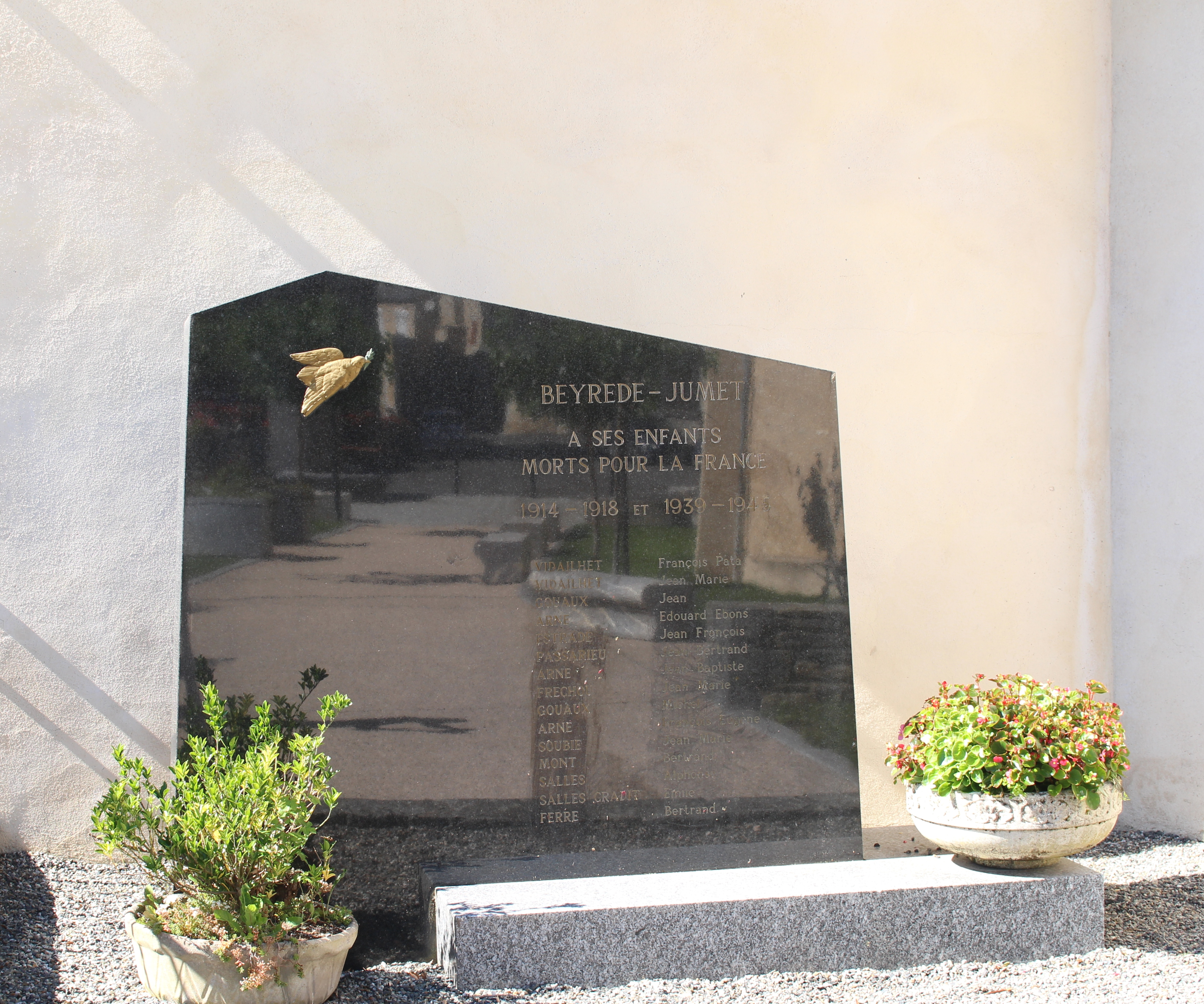 Monument aux morts de Beyrède-Jumet-Camous (Hautes-Pyrénées)